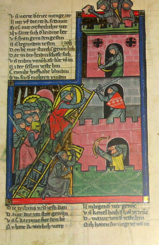 E Facsimile vun enger Säit aus dem Rudolf von Ems senger Weltchronik